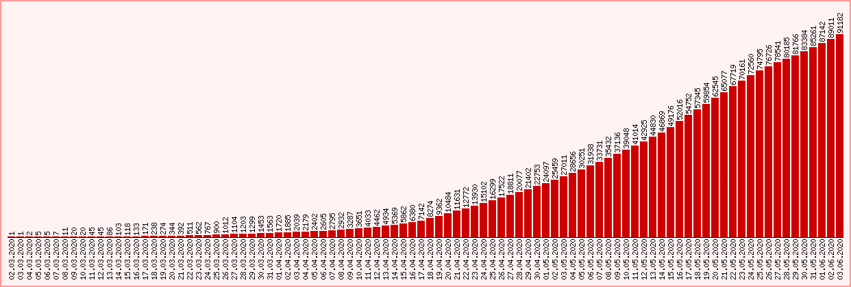 Коронавирус в Саудовской Аравии